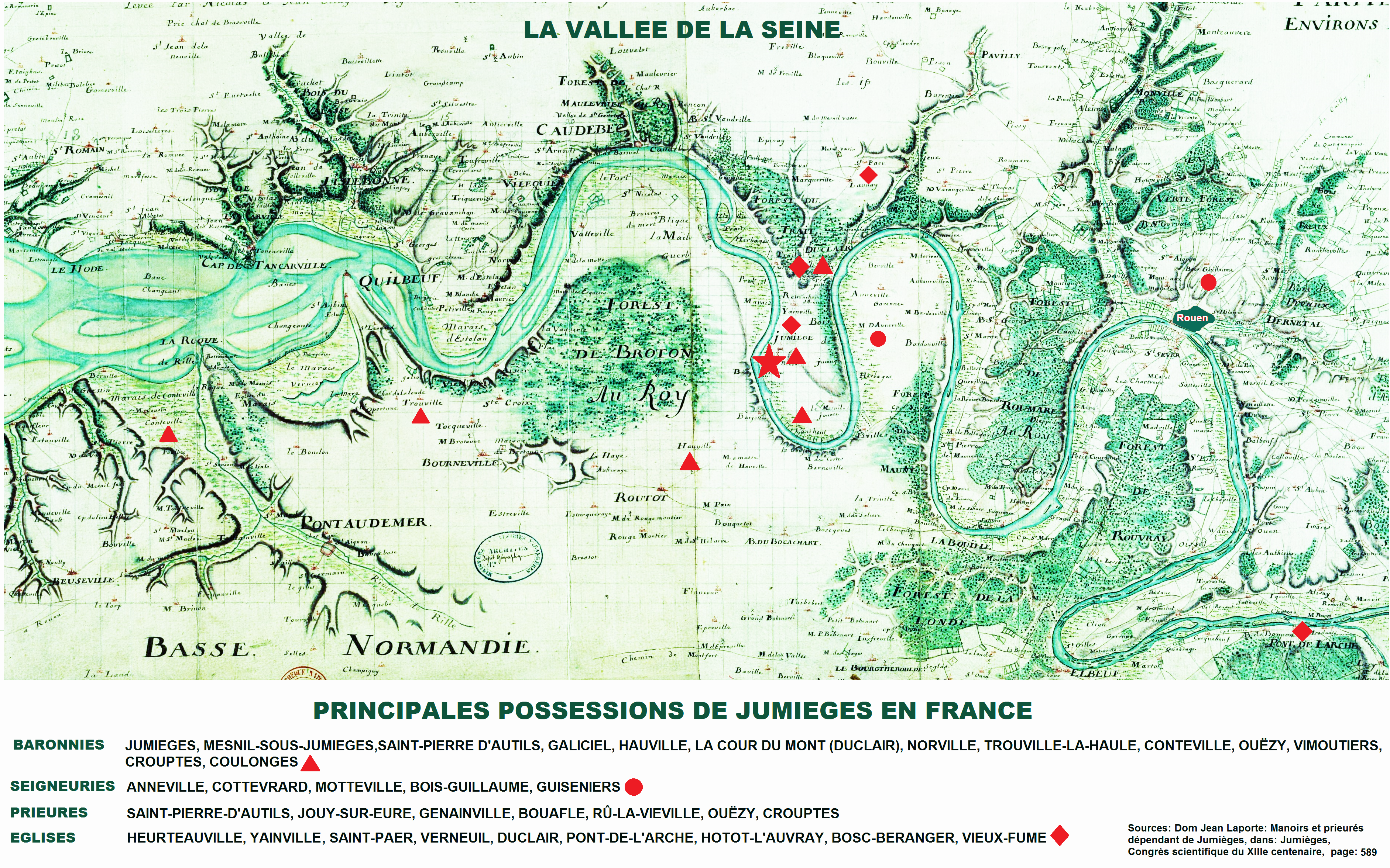 Abbaye de Jumièges, carte des possessions (sur image du domaine public modifiée)